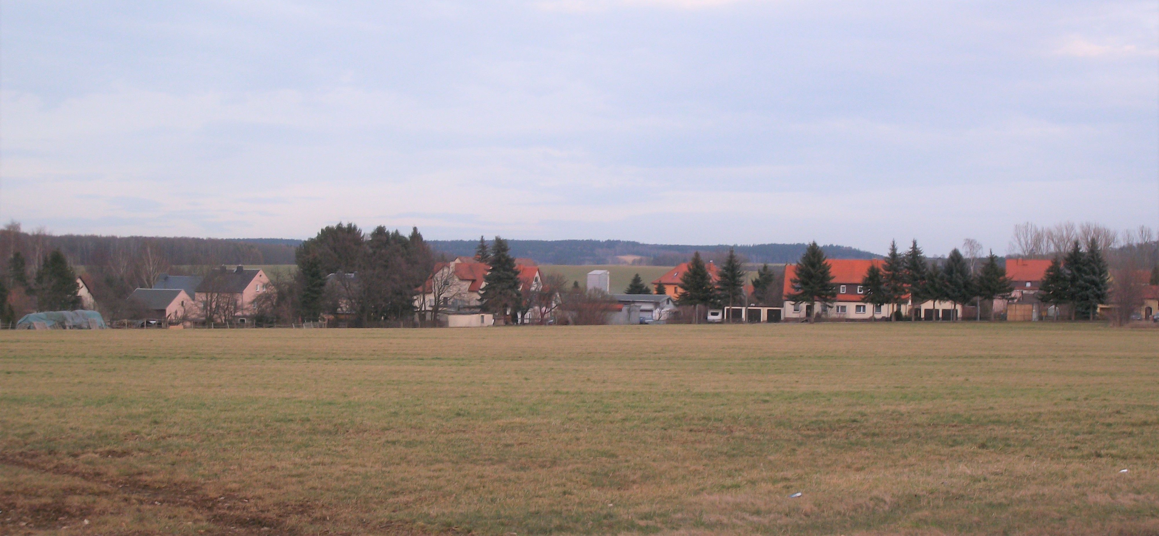 Neudörfchen (Frankenberg), Ortsansich